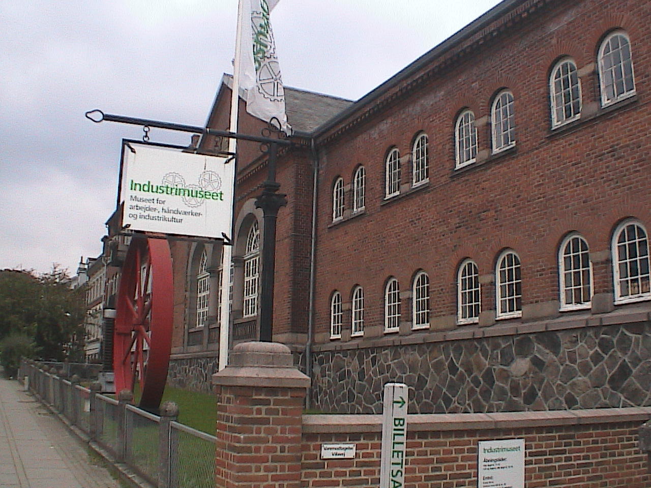 Industry Museum Denmark